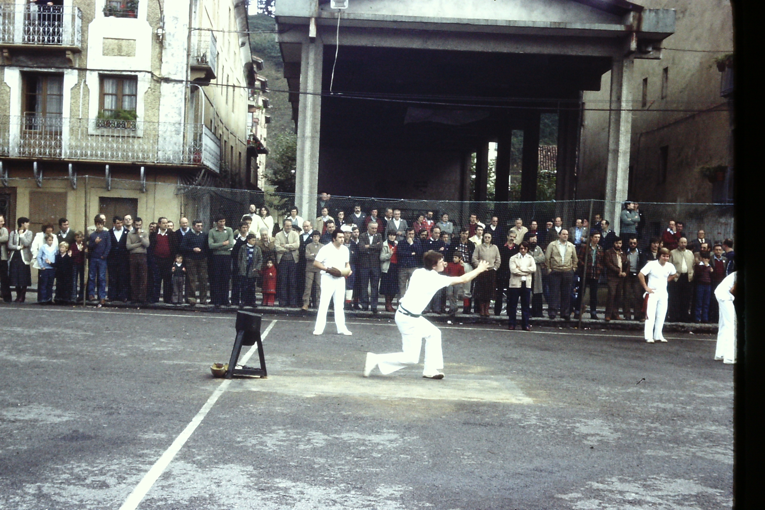 Errebote partidu batean, sakea egiten (Villabona, 1970eko hamarkada)